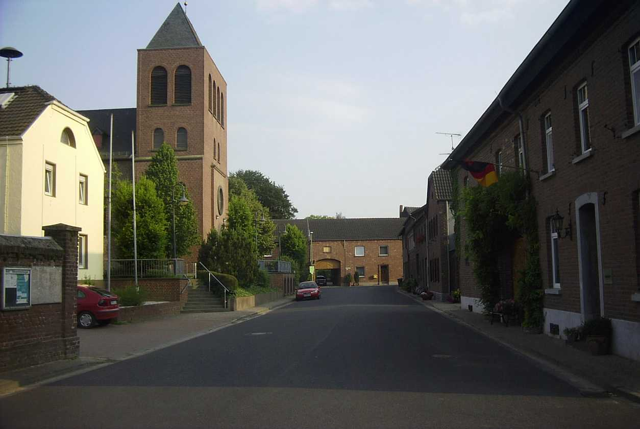 Gevelsdorf, Gemeinde Titz, NRW